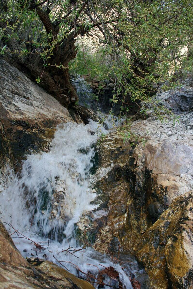 عکاس: مسعود سلیمانی سپهر